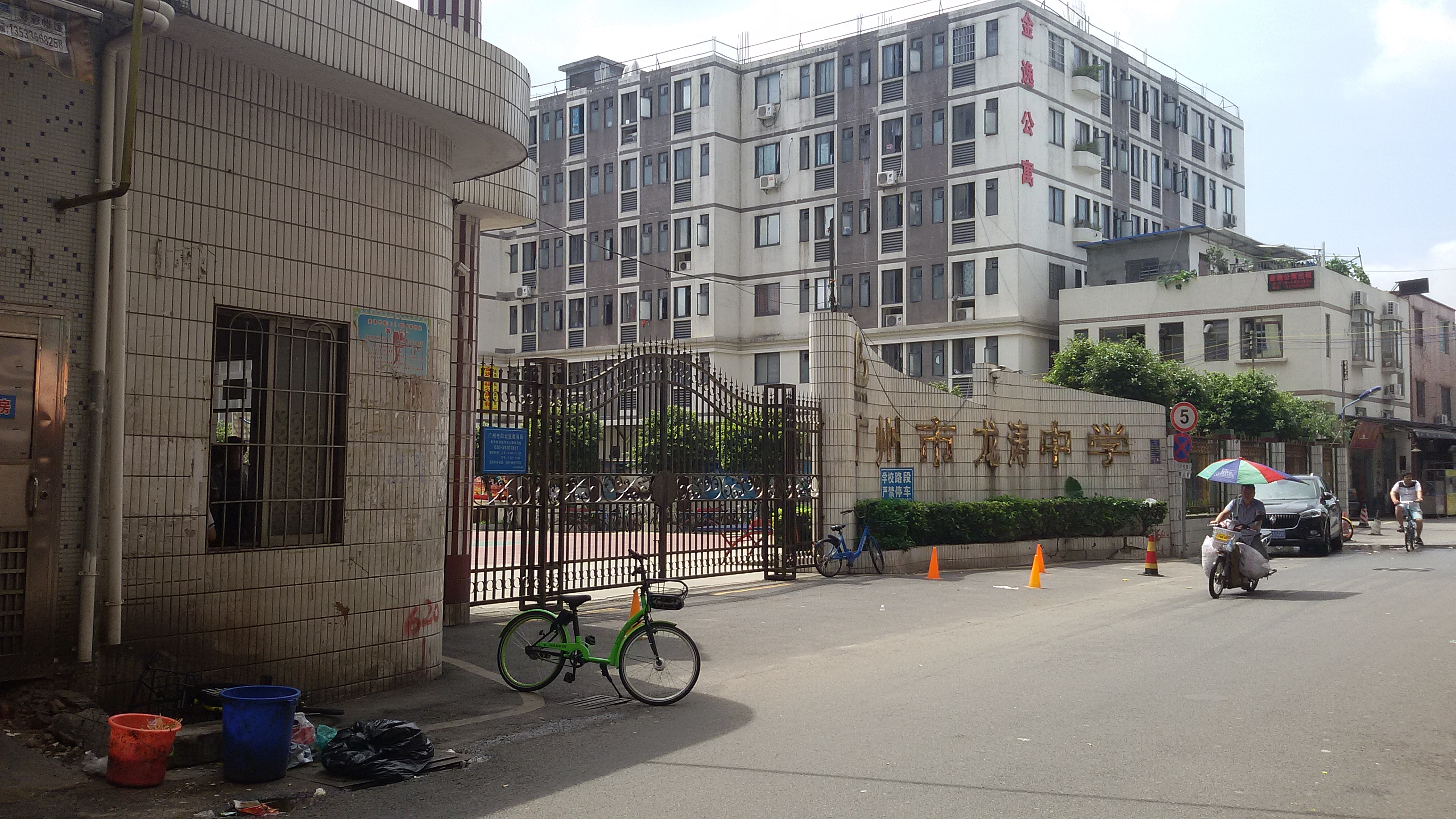 粵語: 廣州市龍濤中學